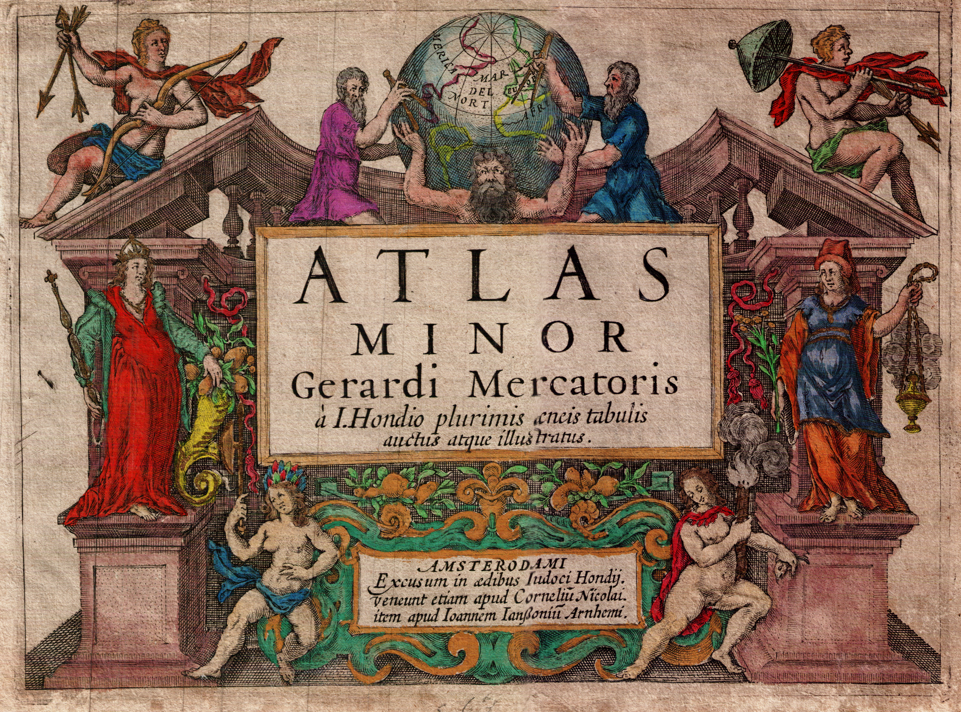 Illustrasjon til Atlas Minor, av Gerhard Mercator og Jodocus Hondius, fra den siste halvdelen av 1500-tallet. Trykket med kobberstikk og håndkolorert. Original bildestørrelse ca 23 x 18 cm. Et eksemplar befinner seg hos Statens kartverk Sjø i Stavanger. THis is the frontispiece of the Mercator-Hondius Atlas Minor 1607 version.